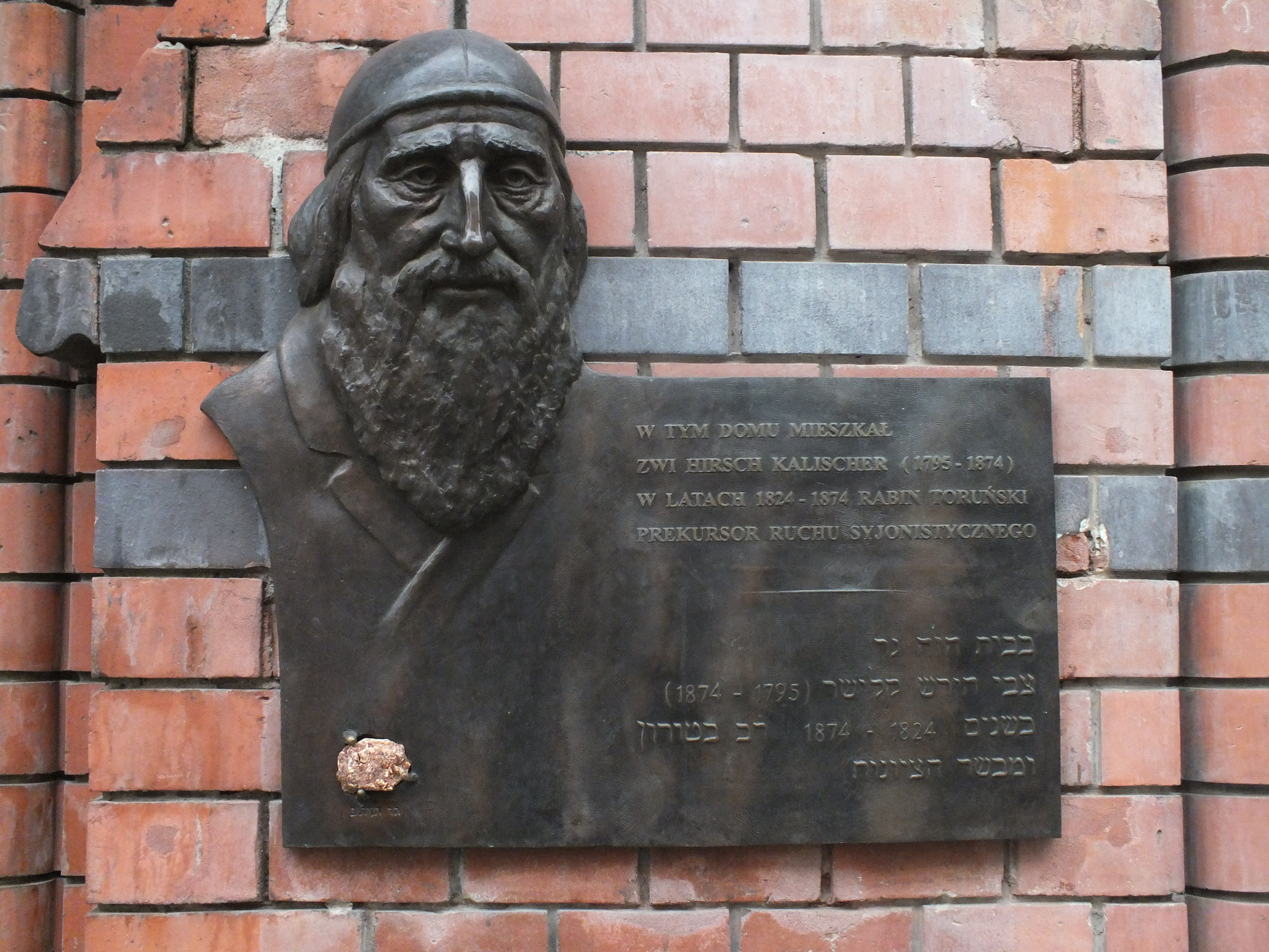 Haus in Toruń mit Gedenktafel